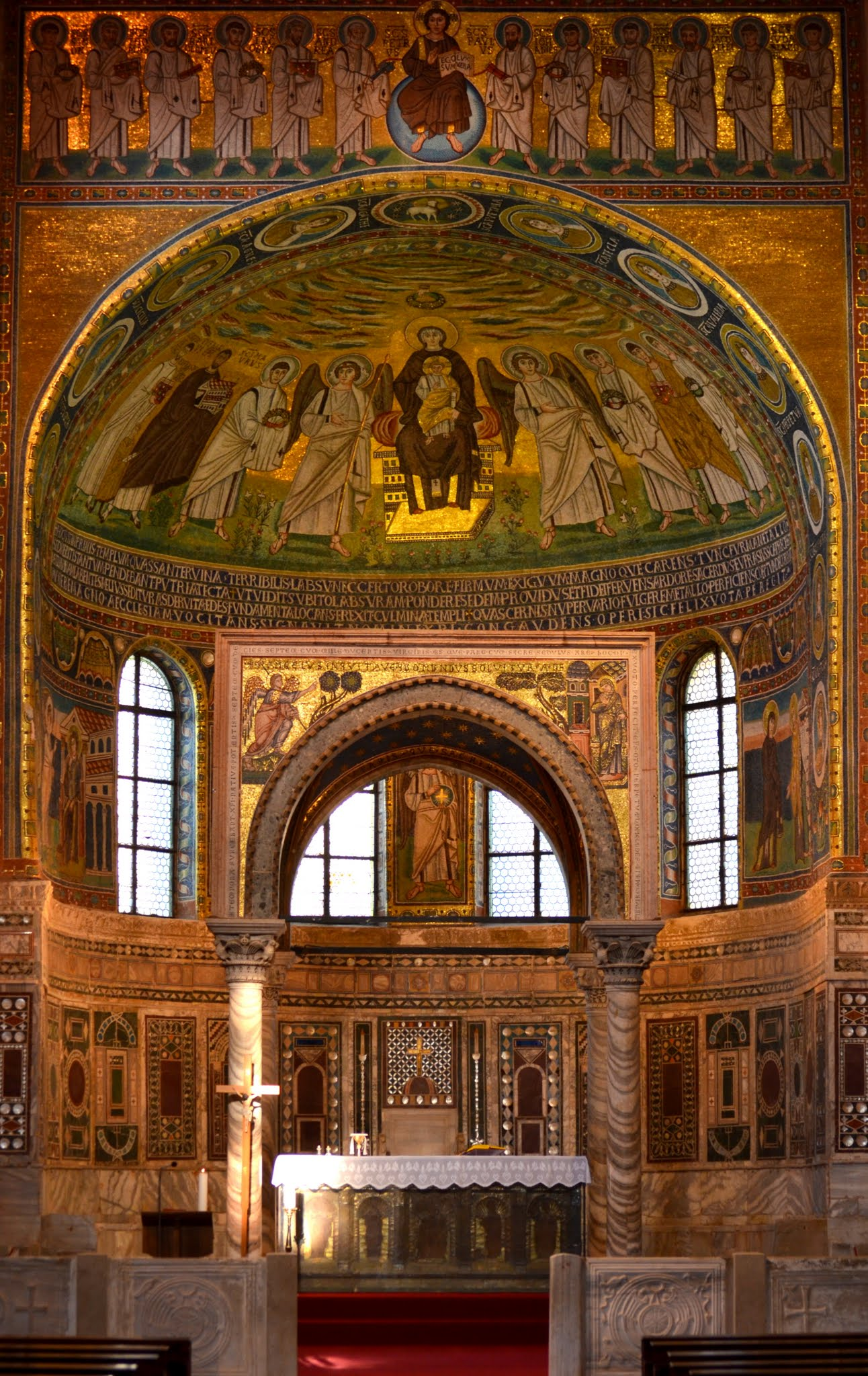 Bazylika Eufrazjana, Poreč